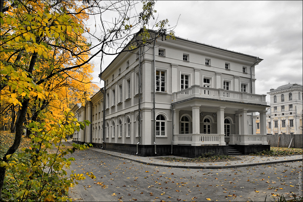 Жыліцкі палац